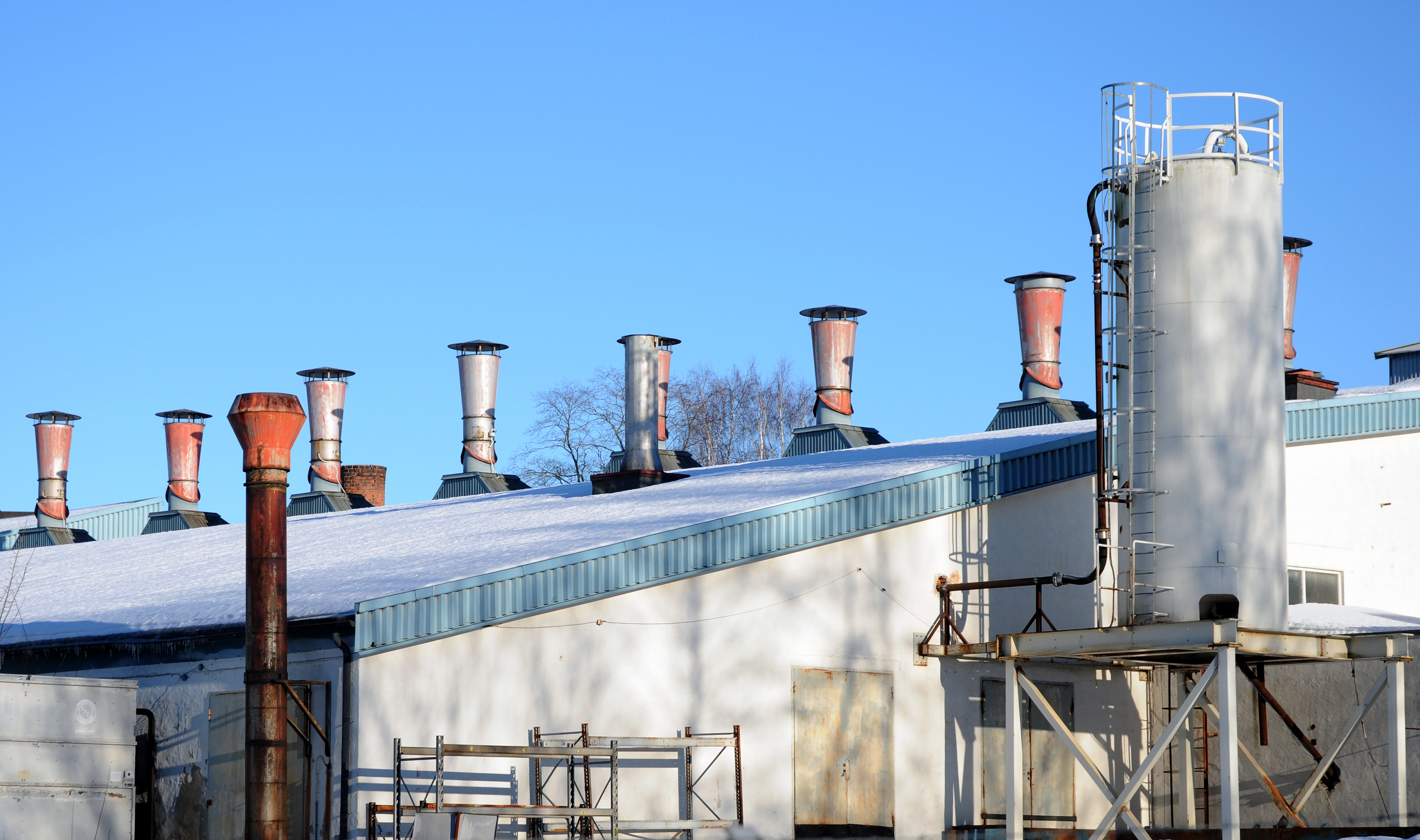 Nävekvarns bruk i januari 2011